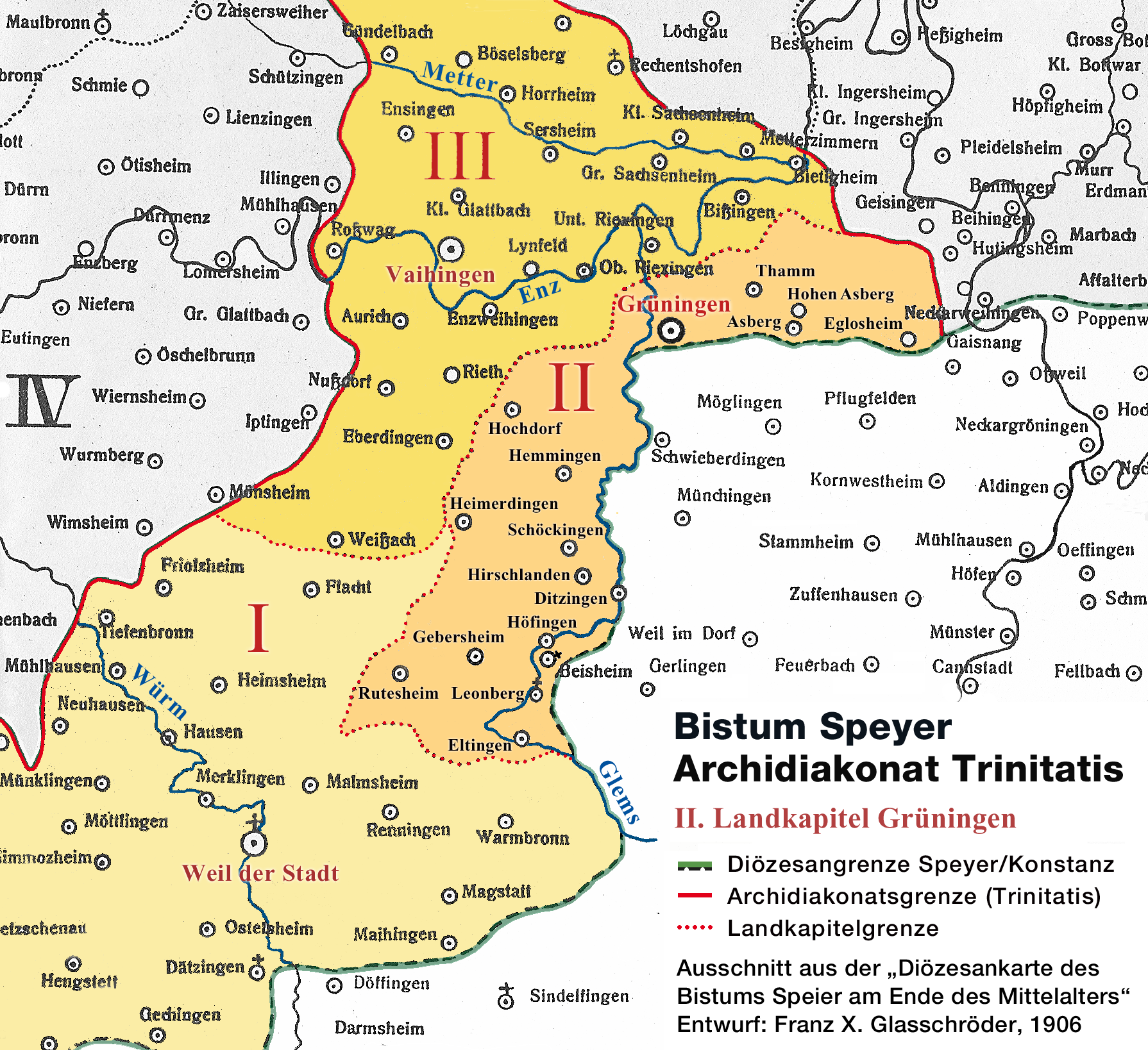 Landkapitel Grüningen im Archidiakonat Trinitatis des Bistums Speyer (um 1500)